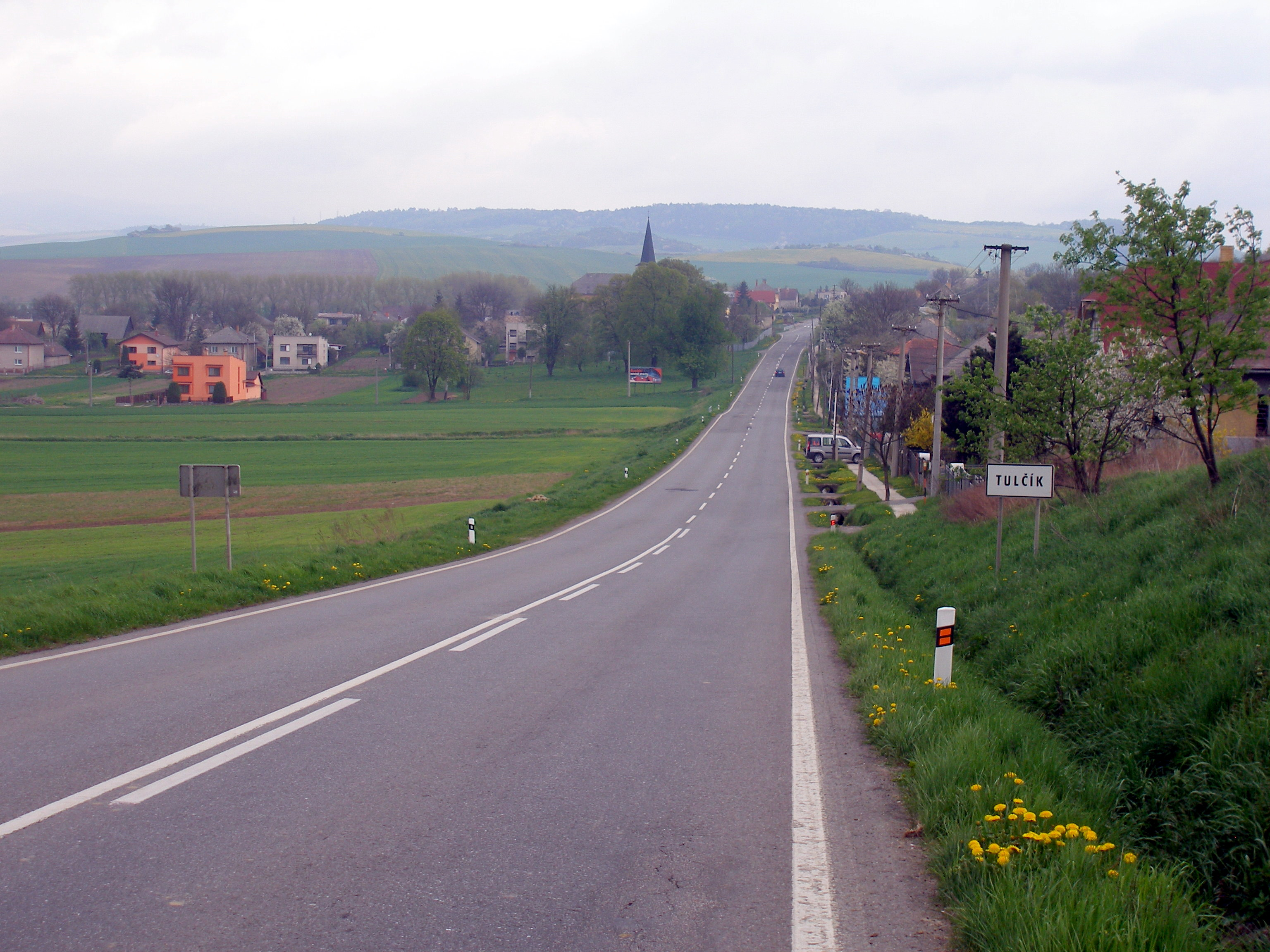 Obec Tulčík okres Prešov región Šariš